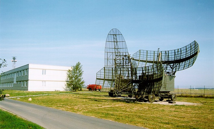 Ein "Pärchen" P-37 und PRW-13 als Ausstellungsstücke auf dem Fliegerhorst Trollenhagen